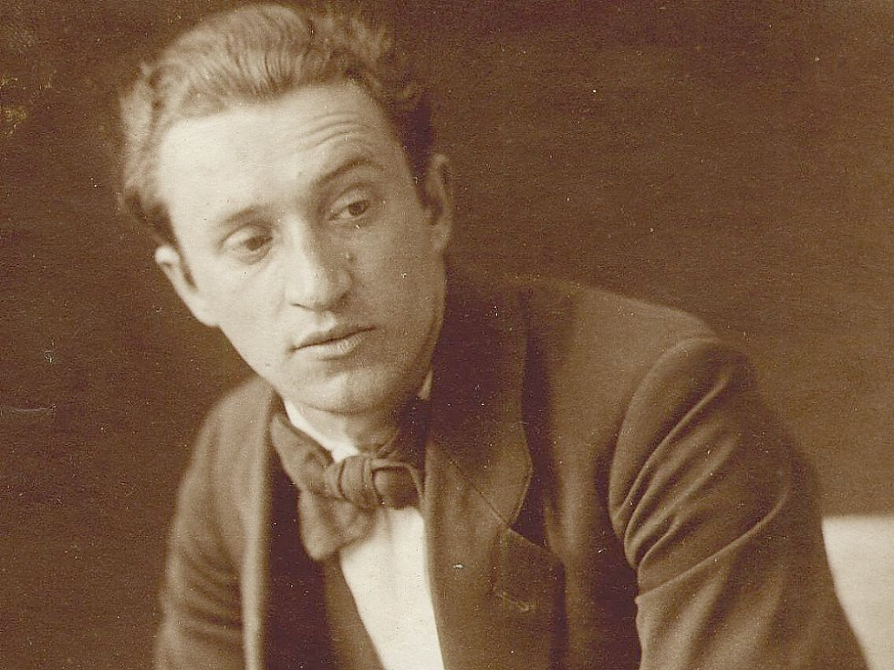 Karel Hojden (1893-1975), český grafik, malíř, ilustrátor a pedagog